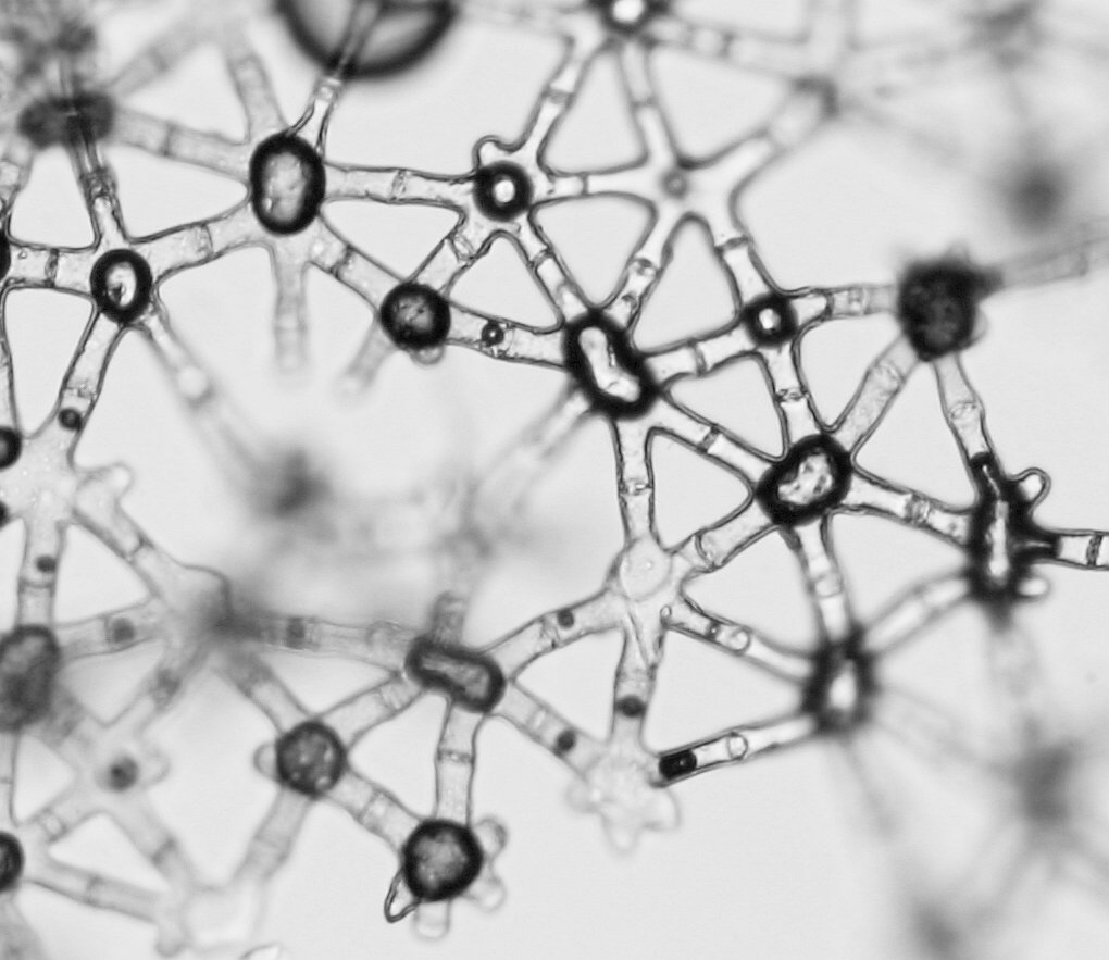 Sternparenchym of a swamp plant Description in de wikipedia Beschreibung: Sternparenchym einer Sumpfpflanze Quelle: Fotografiert am 20.04.2004 mit Canon EOS 300D / Zeiss Axioskop Plus Fotograf / Zeichner: Sebastian Stabinger